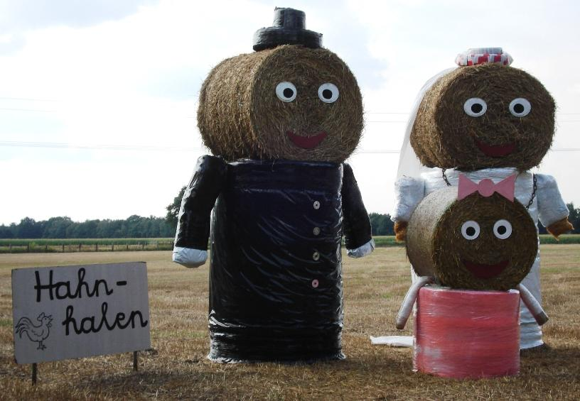 Einladung zum „Hahn holen“